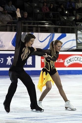 Александра Стапанова и Иван Букин на финале Гран-при среди юниоров сезона 2011-2012